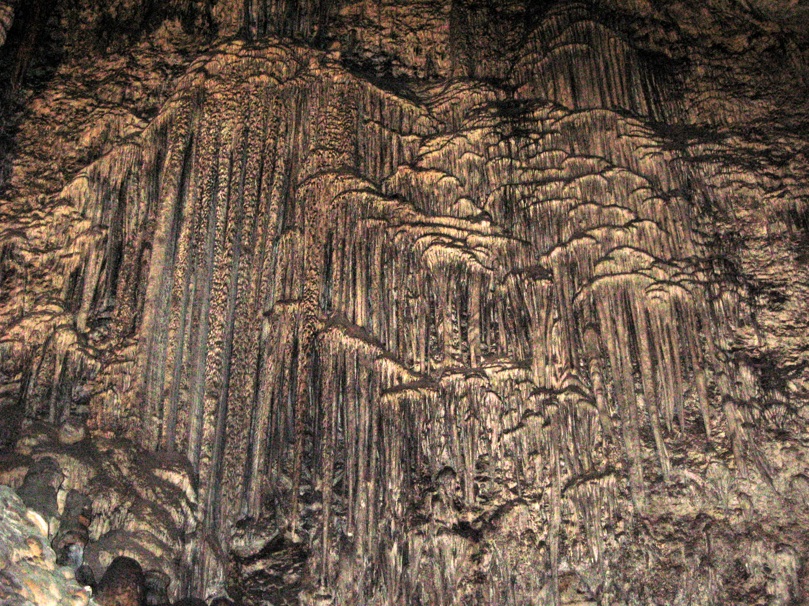 Coves d’Artà, Gemeinde Capdepera, Mallorca, Spanien